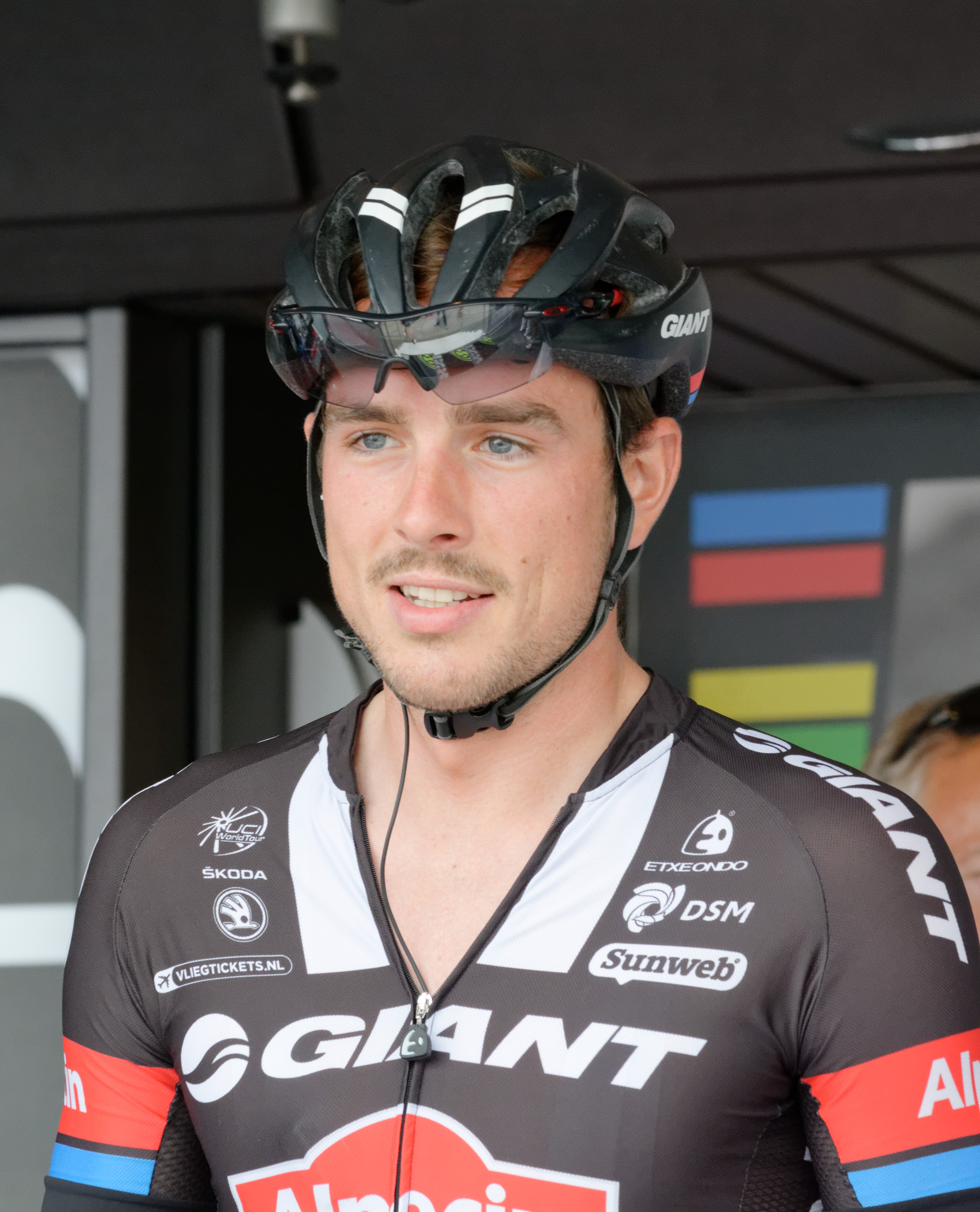 D71_0059_DxO